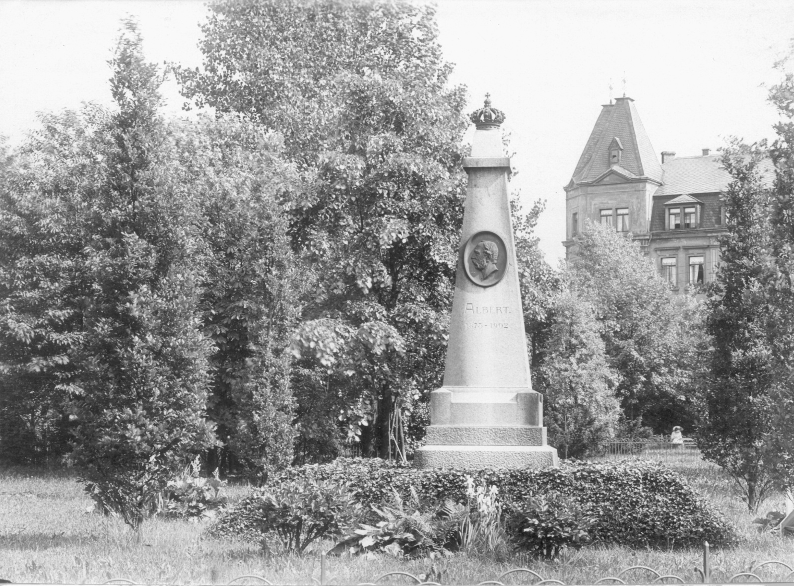 Deuben (Freital-Deuben). König-Albert-Park (Einweihung 23.04.1902) mit König-Albert-Denkmal